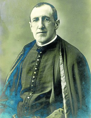 Retrato de Sixto Córdova y Oña, autor del "Cancionero popular de la provincia de Santander" y una de las principales figuras de la música en Cantabria.